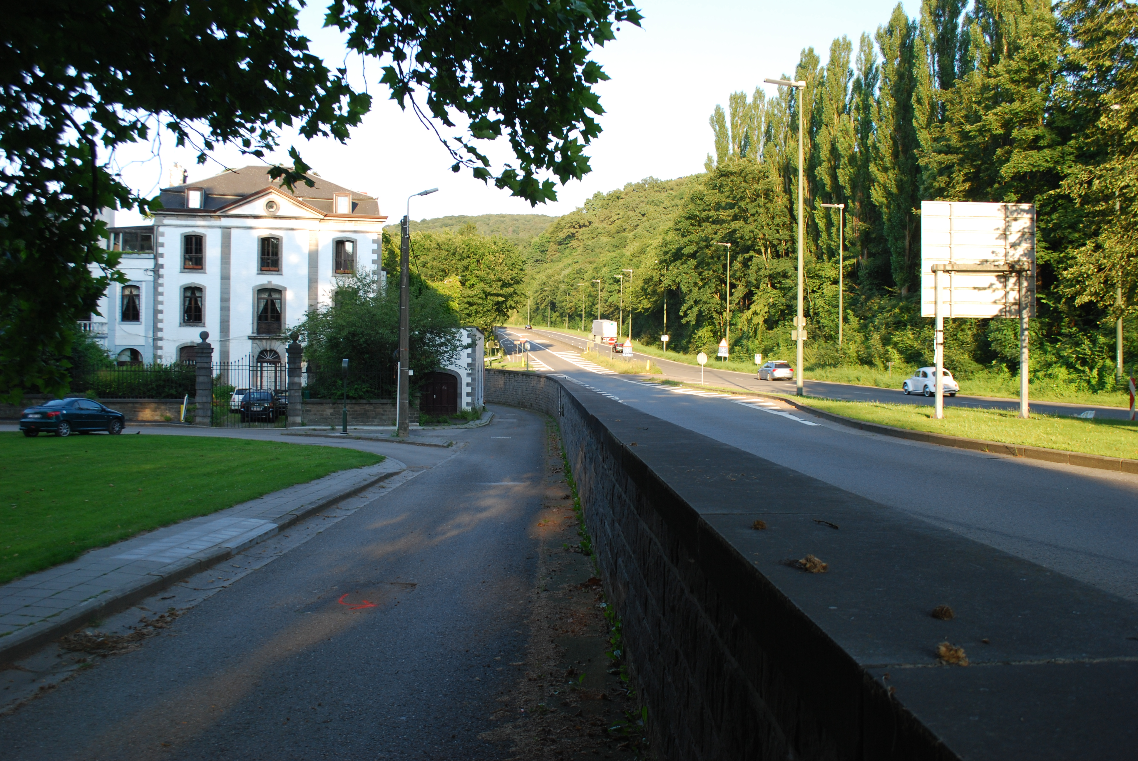 Vue de la place du Saucy, à Tilff, et de la rampe d'accès à l'autoroute E25 Luxembourg-Liège